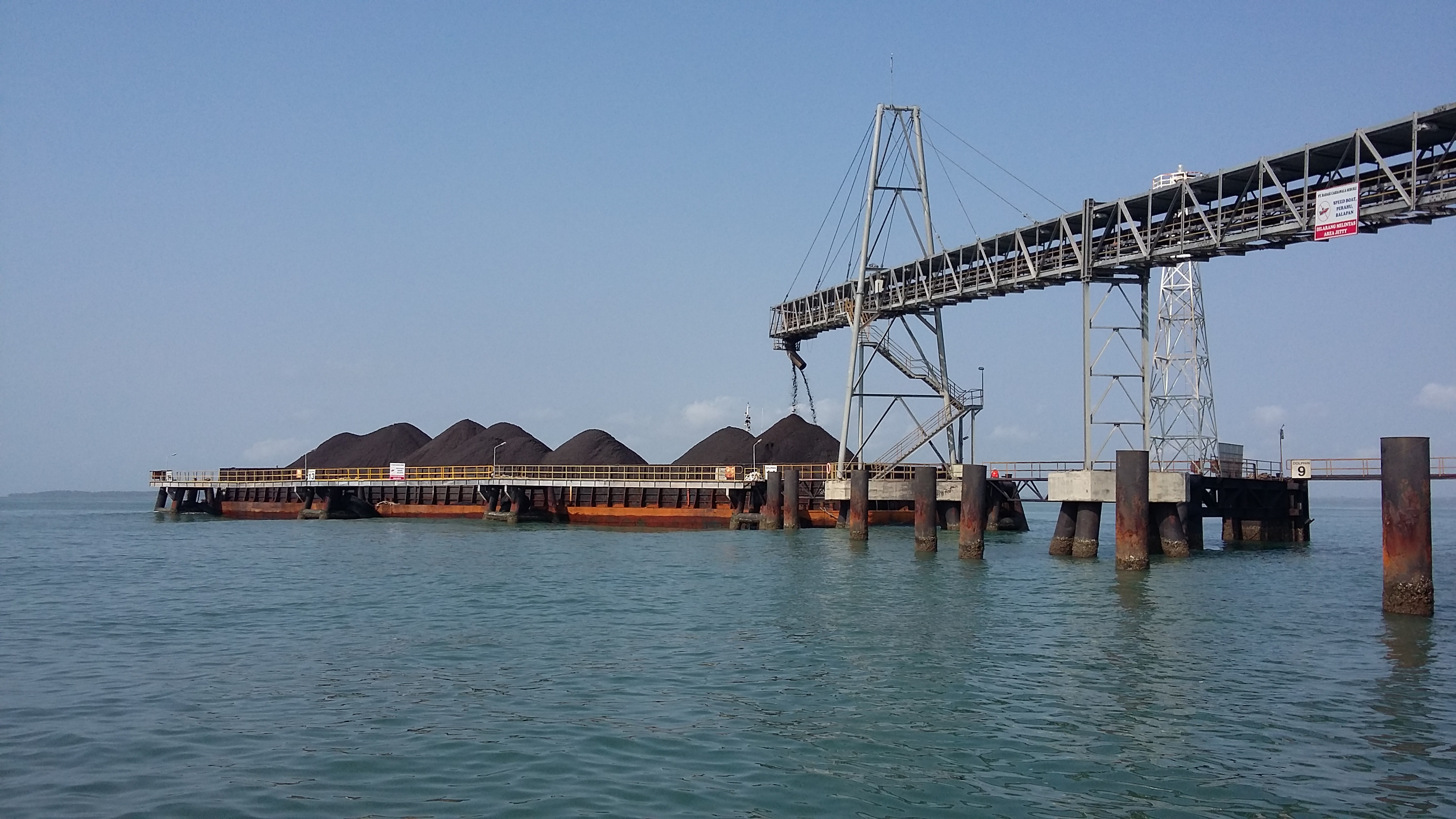 Proses pemuatan batubara menggunakan konveyor ke tongkang.